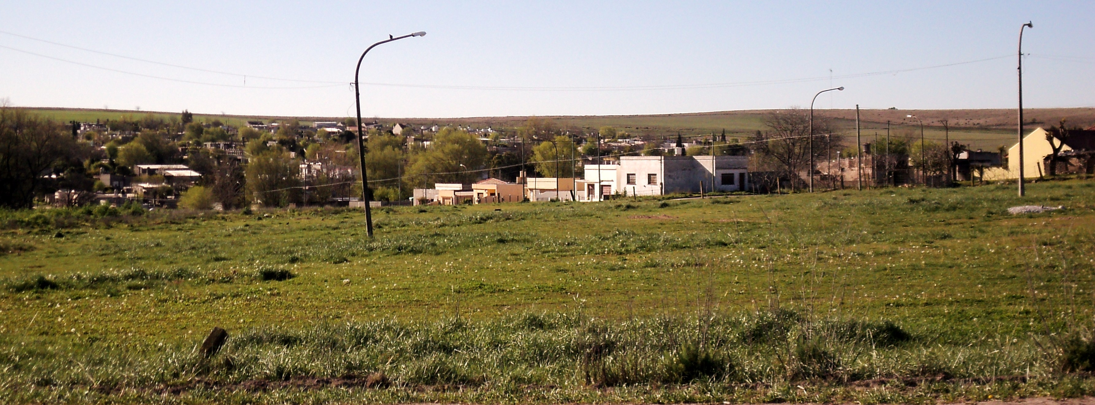 urbanismo en la entrada de la localidad